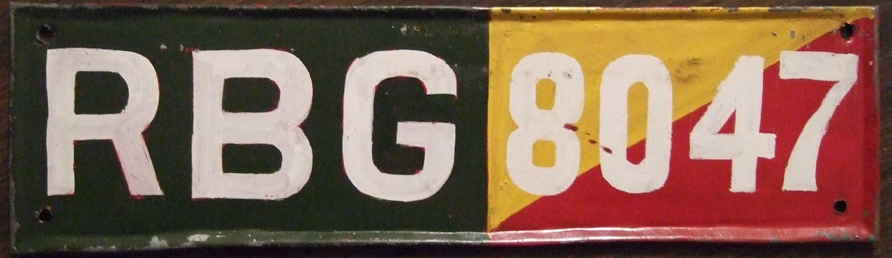 BHUTAN Royal Bhutanese Guard 1970's